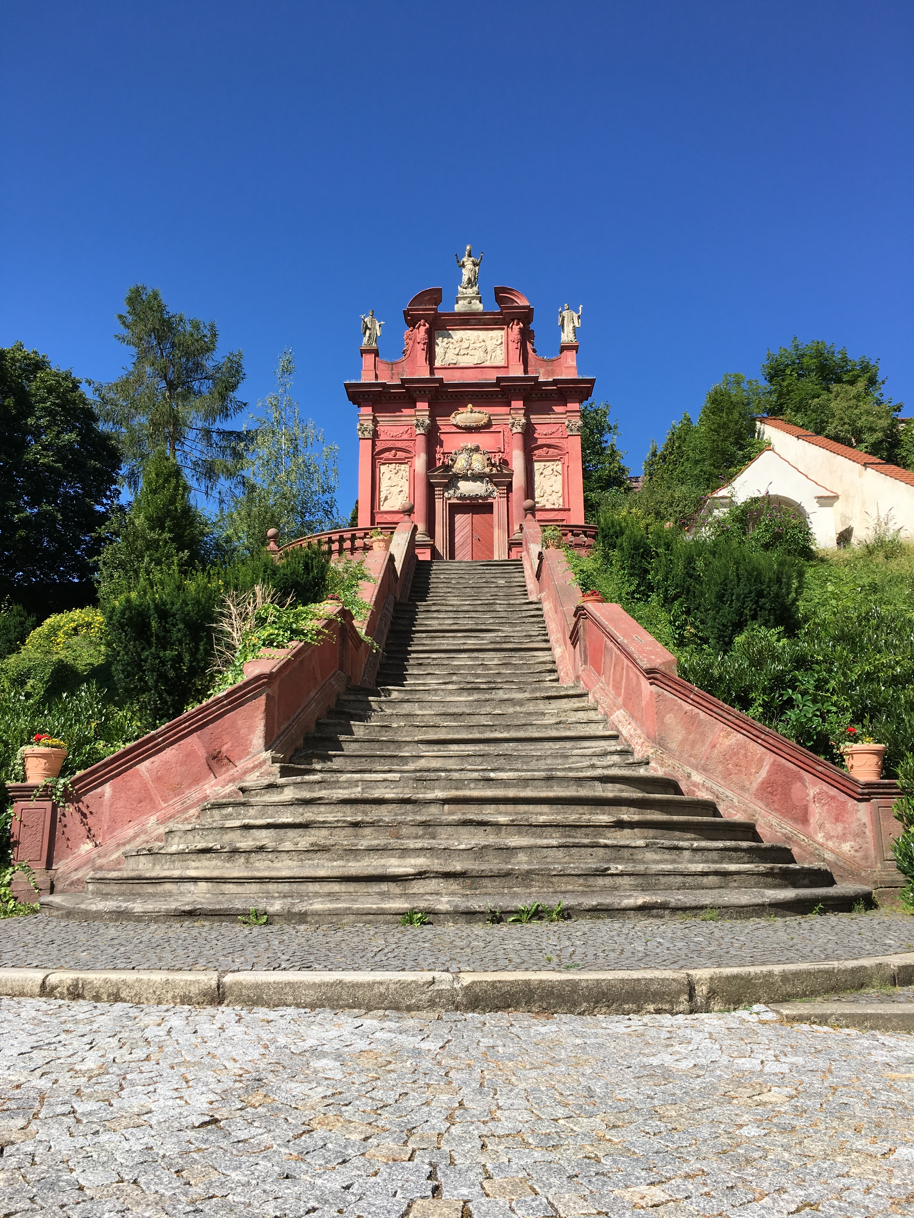 ostrovská barokní kaple